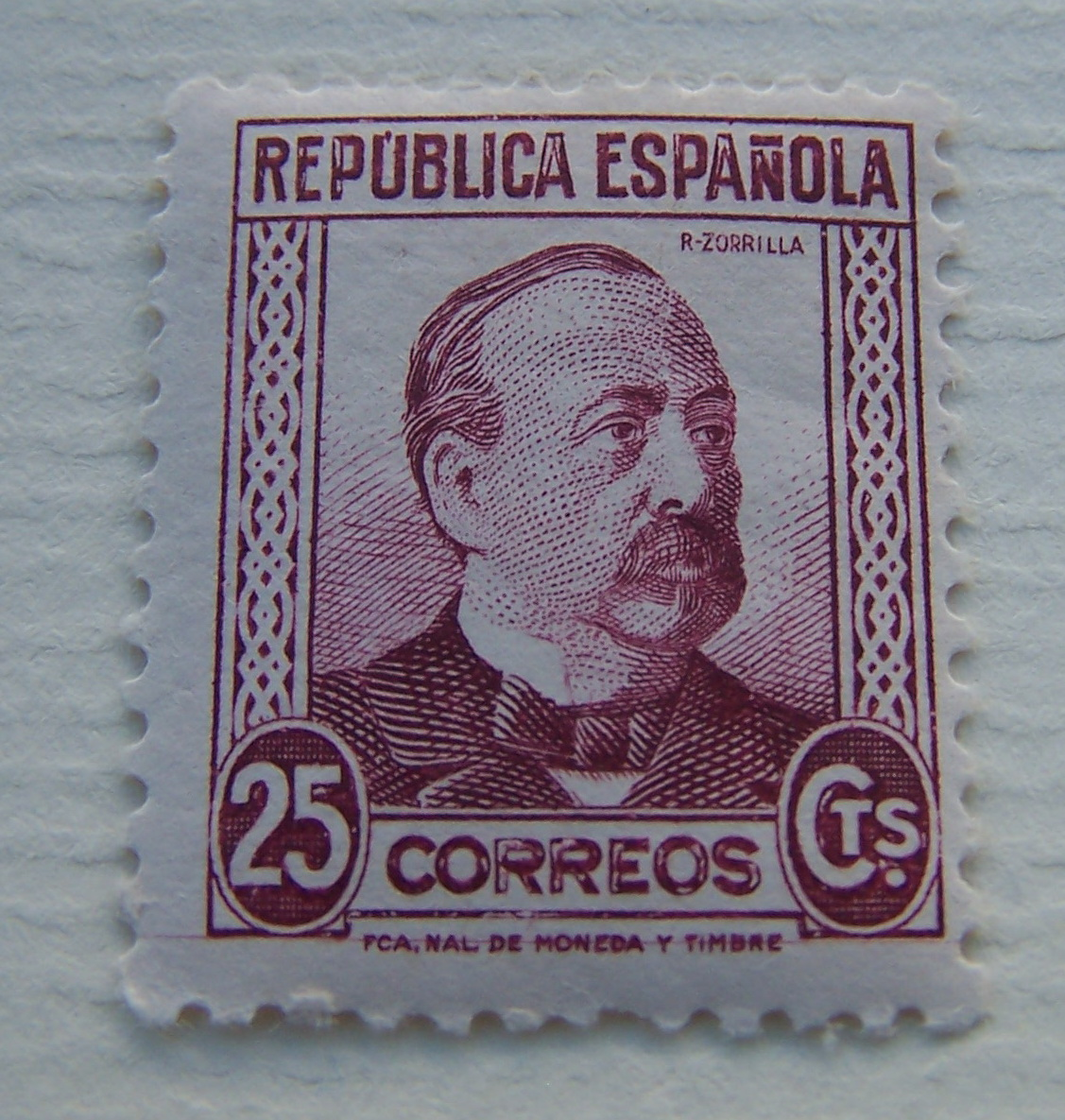 Sello de 25 céntimos 1933 (personaje: Manuel Ruiz Zorrilla)